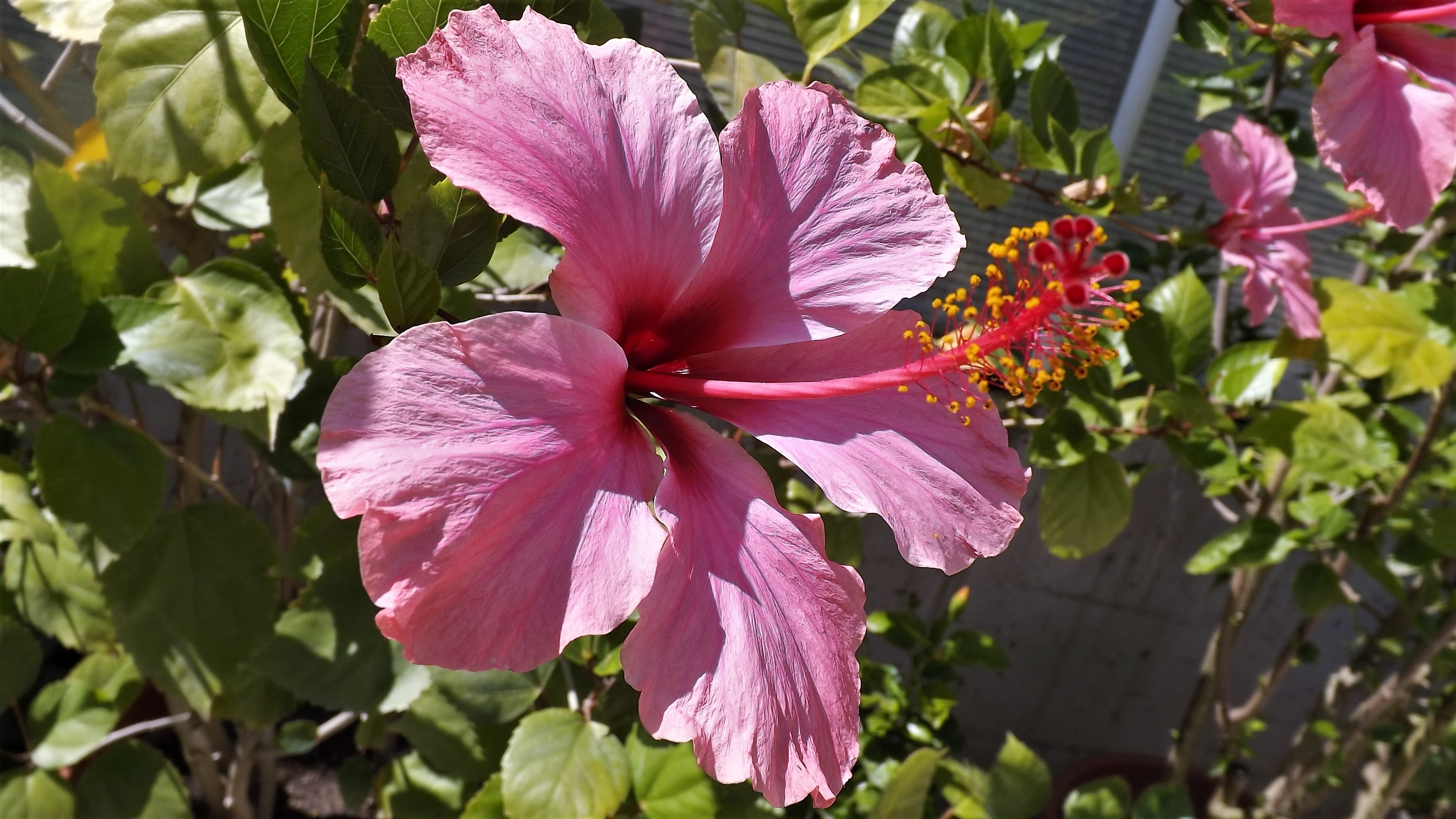 Hibiscusvirág a vácrátóti botanikuskertben